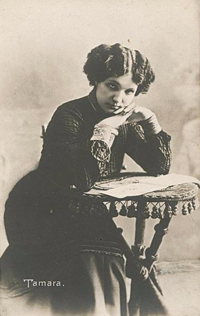 Тамара, Наталия Ивановна (настоящая фамилия Митина-Буйницкая)